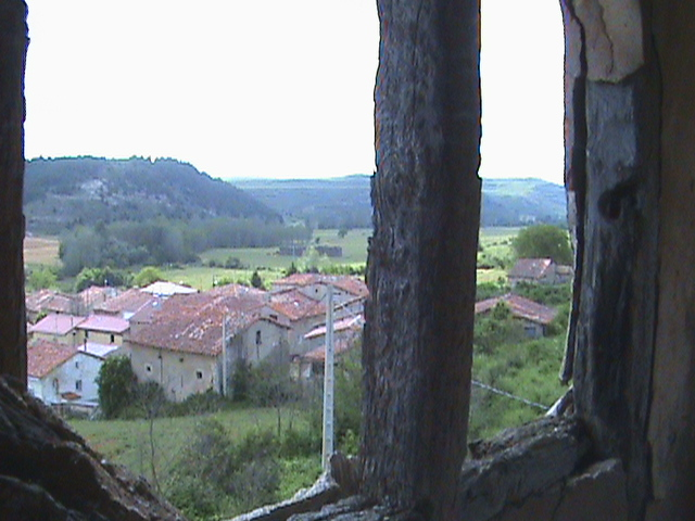 Excelentes vistas de Villalbos y del Valle de Oca desde lo alto del Campanario.